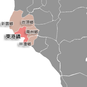 屏東縣東港鎮相對位置。